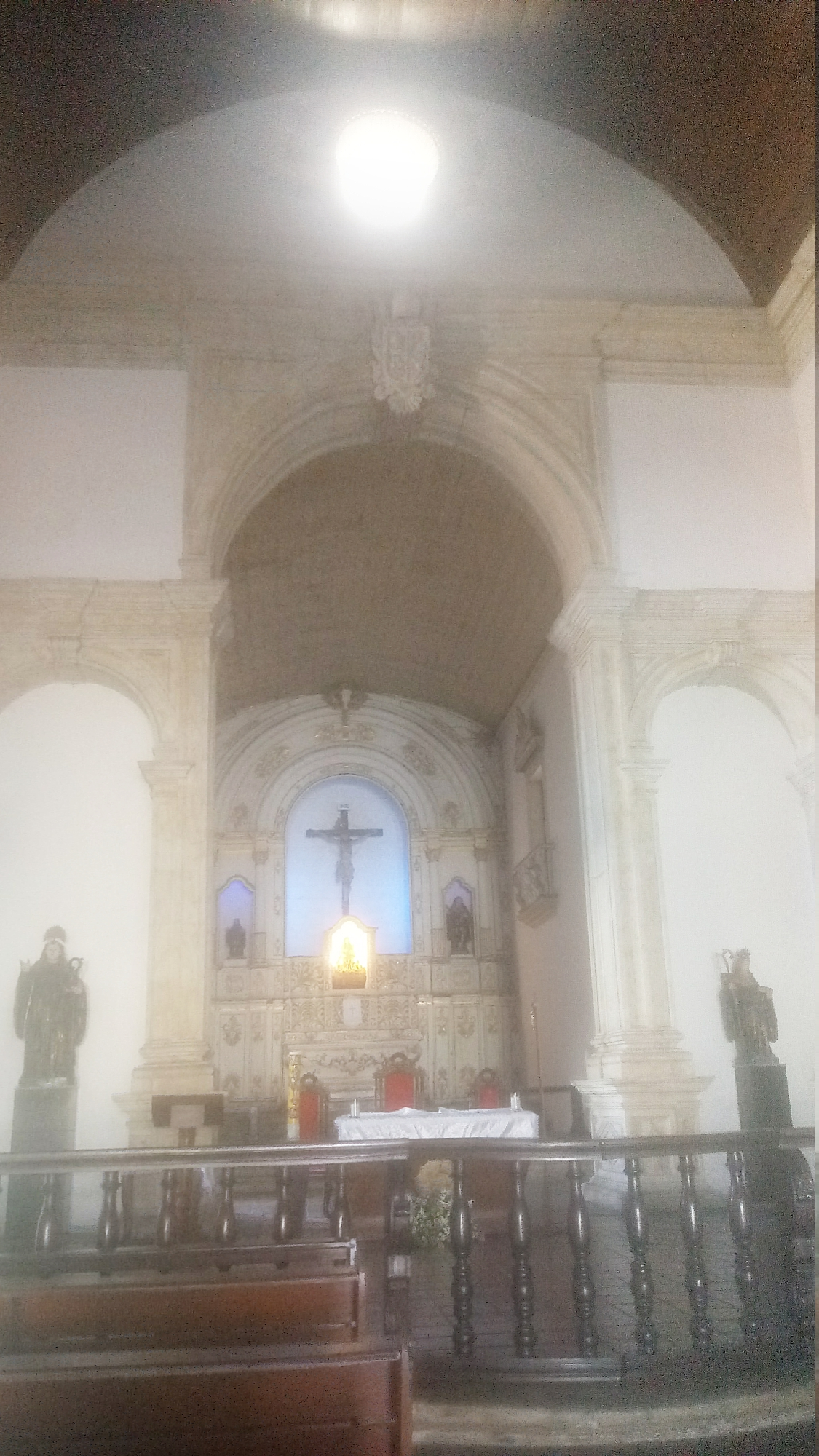 Parte interna do Mosteiro de São Bento em João Pessoa, Paraíba.